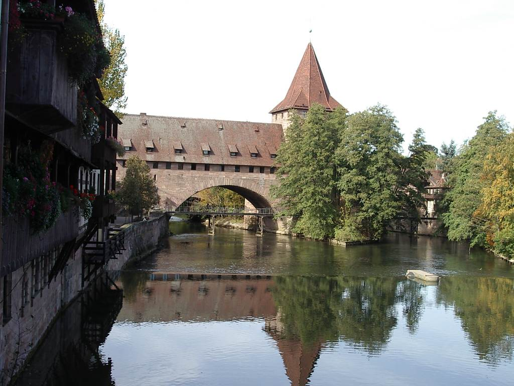 Beschreibung Nürnberg, sog. Fronfeste (um 1498/94) und Schlayerturm, davor Kettensteg (1824), v.O. (Herbst 2003) Quelle Fotographiert (Herbst 2003) Fotograph --Keichwa Copyright Status GNU Freie Dokumentationslizenz Fronfeste und Schlayerturm sind Bestandteil der Nürnberger Stadtmauer.